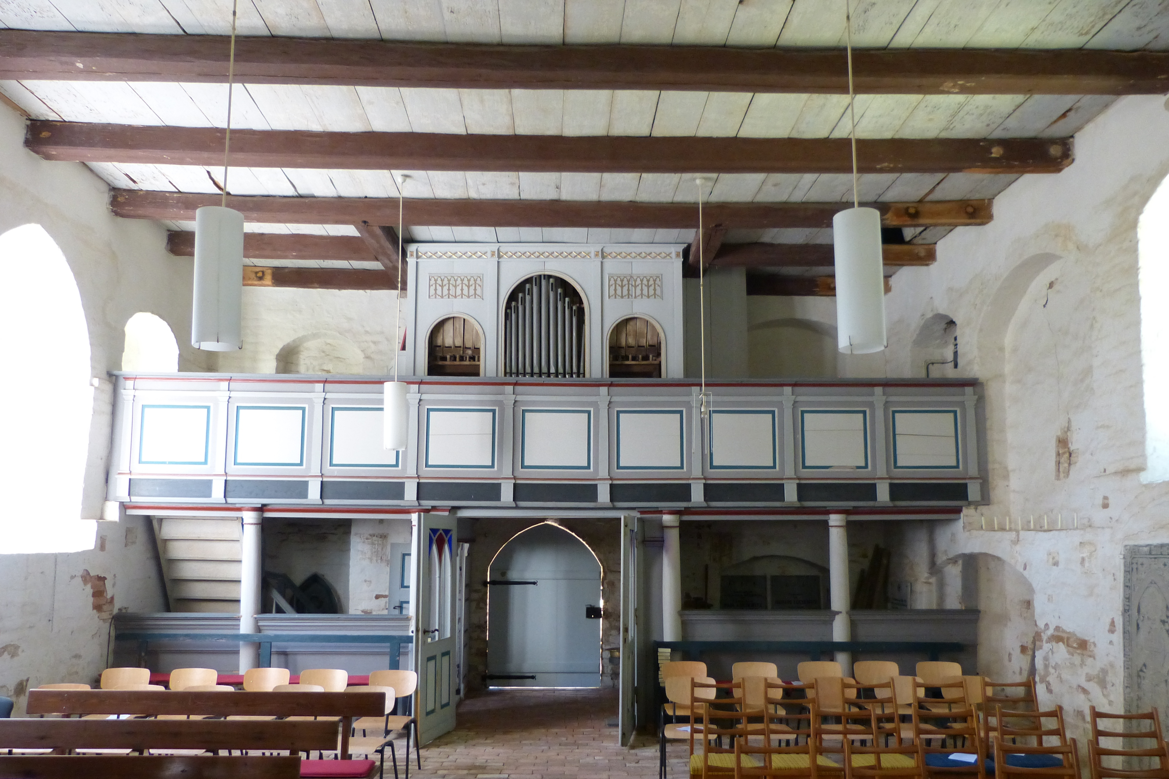 Kirche in Pinnow (Gemeinde Murchin), Orgelempore